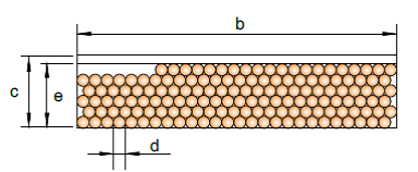 Wicklungsaufbau des im Text ausgeführten Berechnungsbeispiels